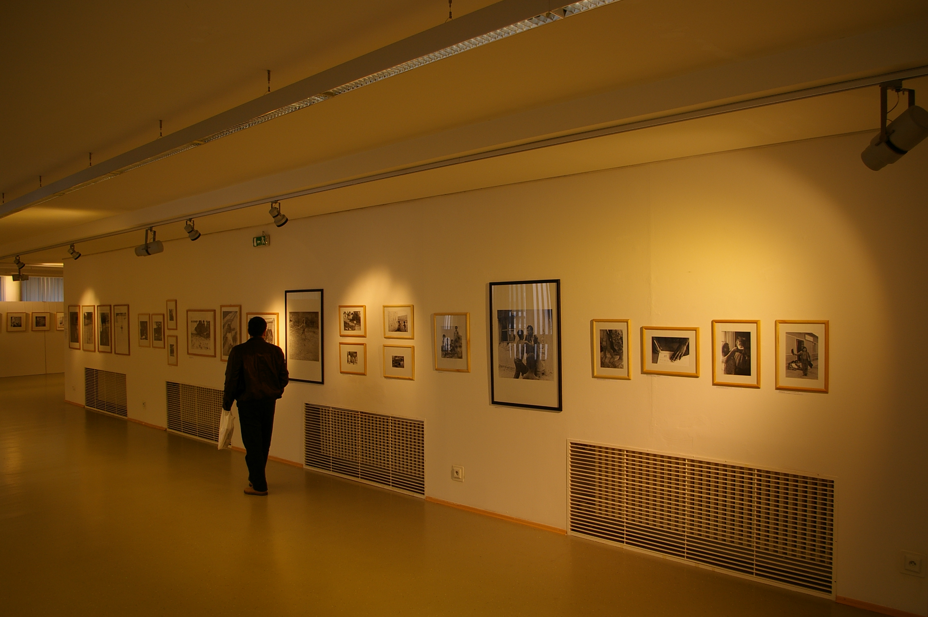 Mesiac fotografie Bratislava 2013 Na cestě